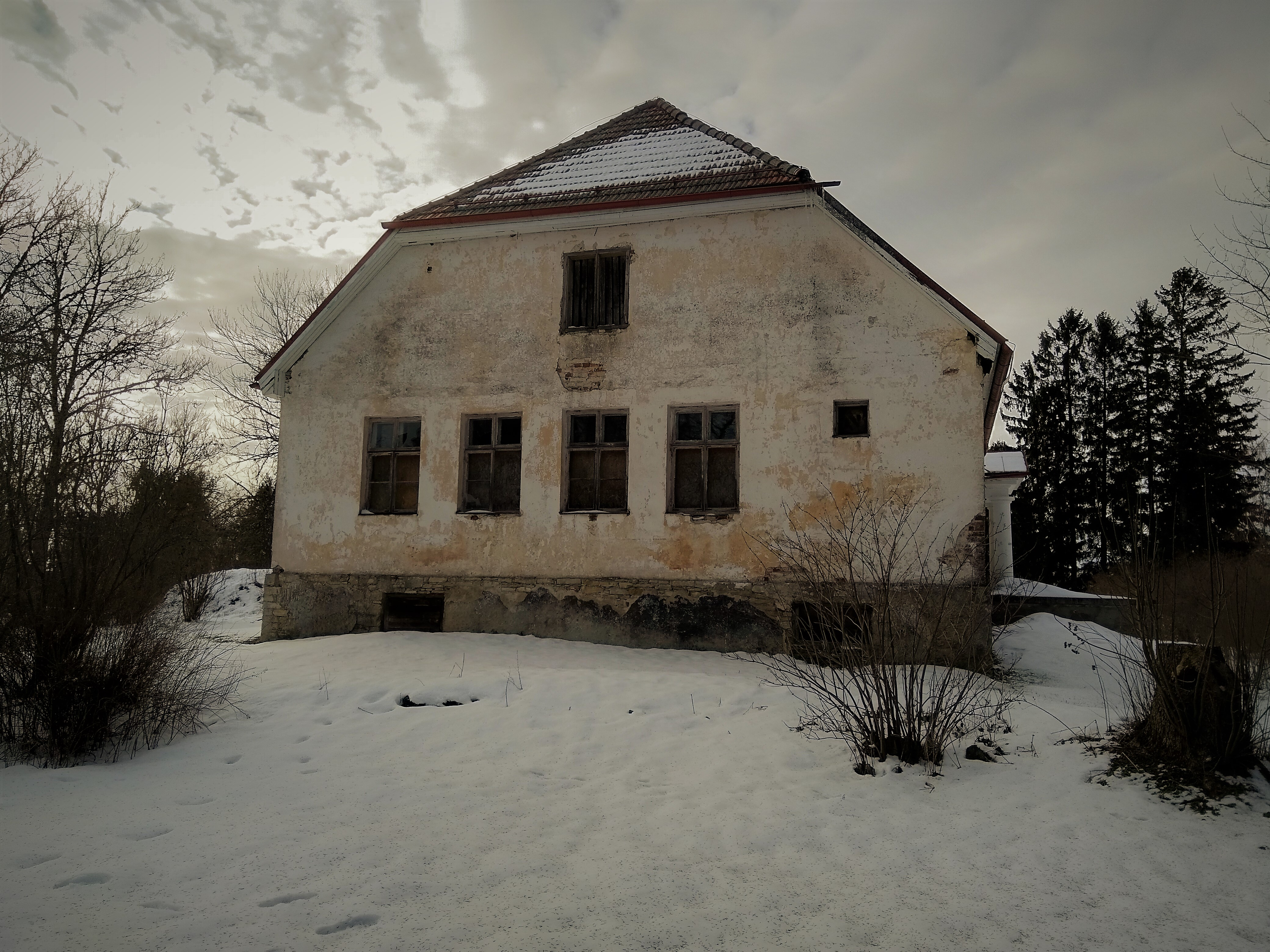 Koonga mõis. Künkal asuva mõisahäärberi loodekülg.